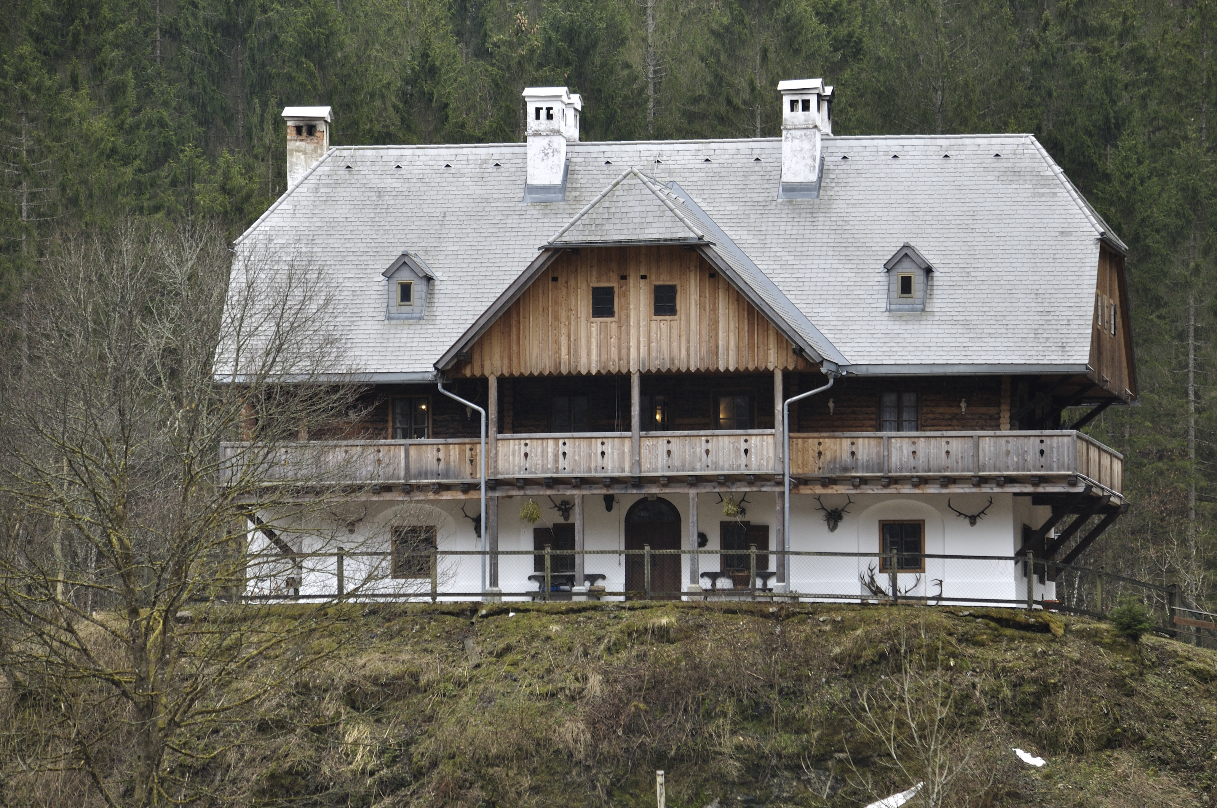 Lamberg´sches Forsthaus und Nebengebäude